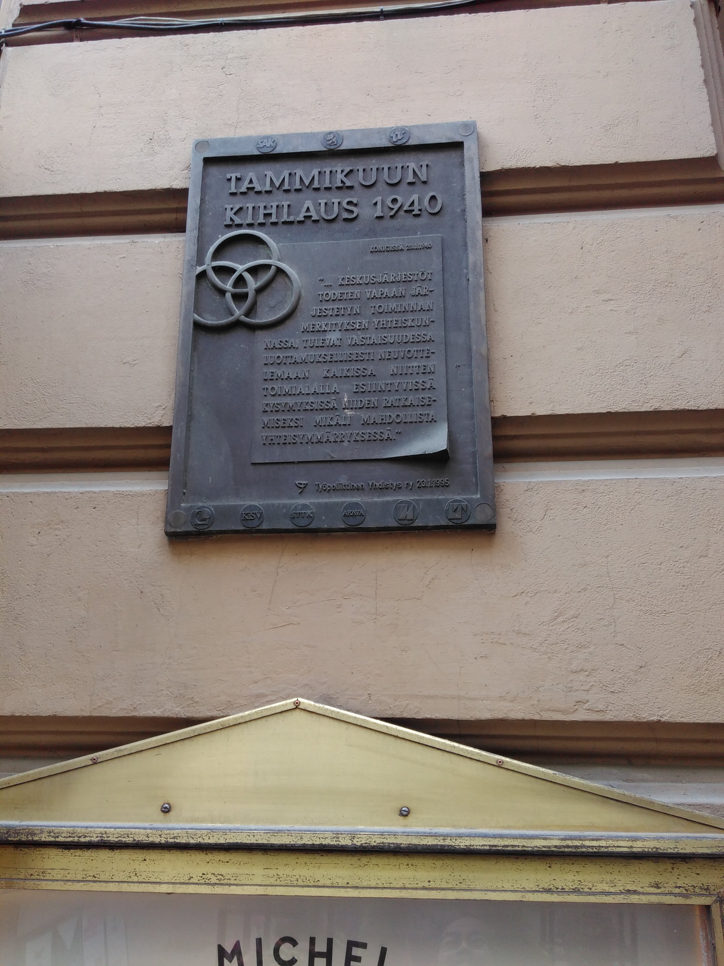 Tammikuun kihlaus -kyltti Helsingin König-ravintolan edessä